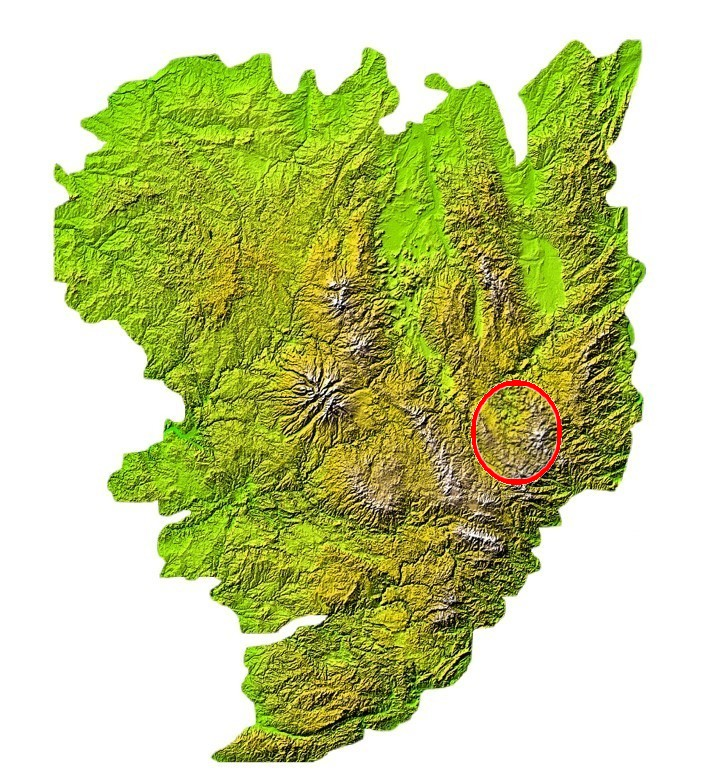 Localisation des monts du Velay sur la carte du Massif central